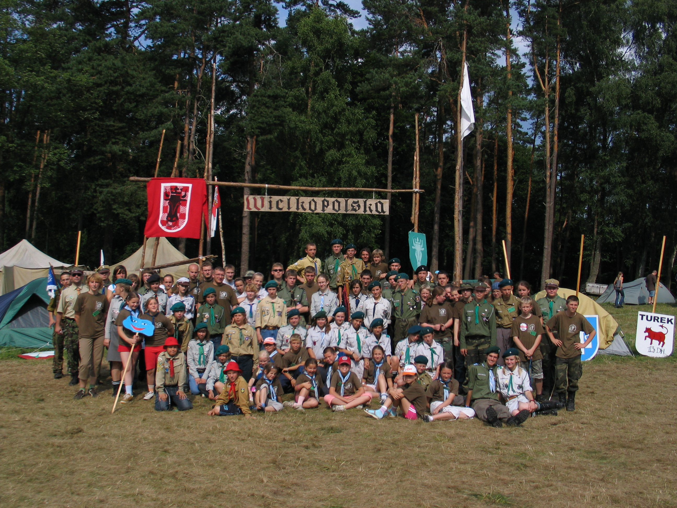 "Wspólnota Drużyn Grunwaldzkich" - Ogólnopolski Harcerski Zlot Grunwaldzki - Gniazdo Wielkopolskie